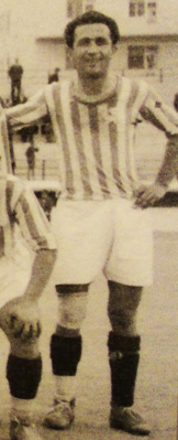 O Τάσος Κρητικός το 1936